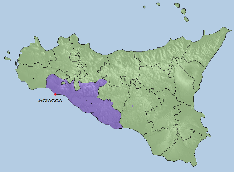 Lokatie van Sciacca op Sicilië